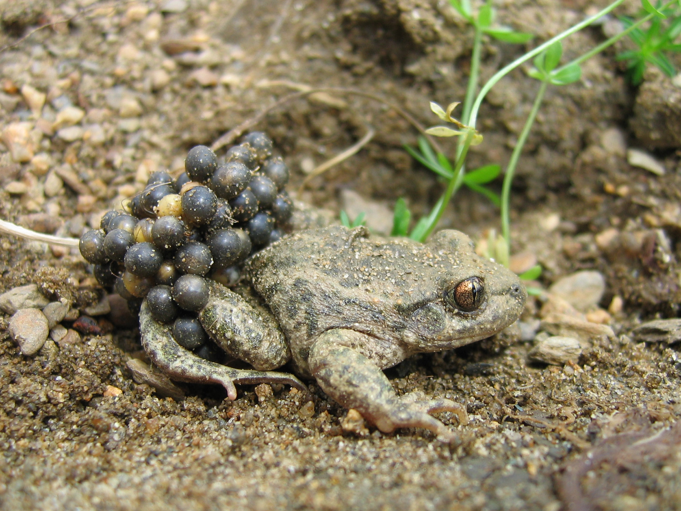 Alytes obstetricans almogavarii (Pyrénées Orientales 66)